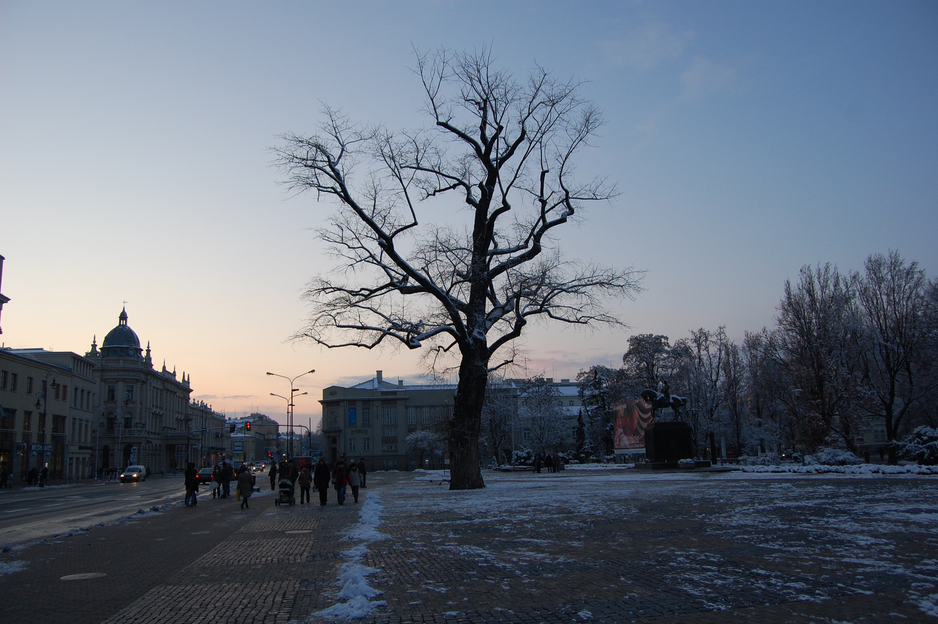 Plac Litewski w Lublinie, baobab